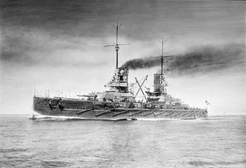 Großlinienschiff "SMS Prinzregent Luitpold" Großlinienschiff der Kaiser-Klasse "S.M.S. Prinzregent Luitpold" auf See, Ansicht der Backbord-Seite